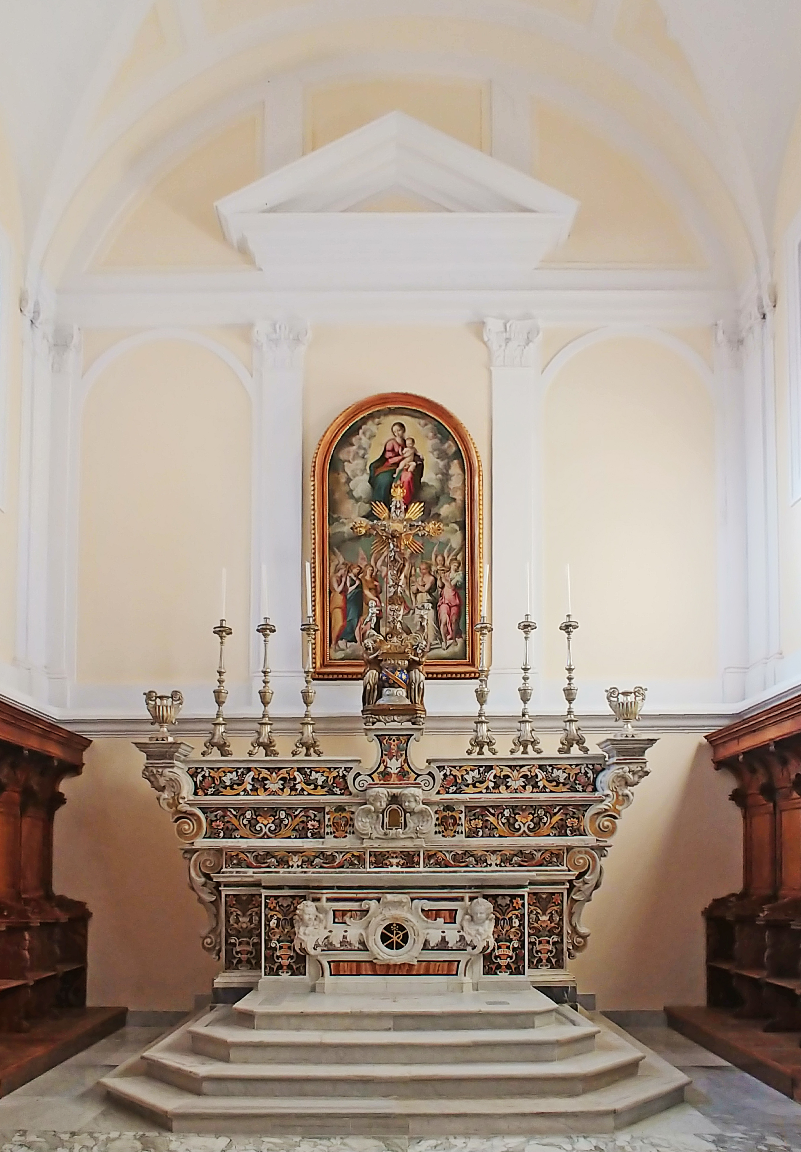 Parete fondale dell'abside.